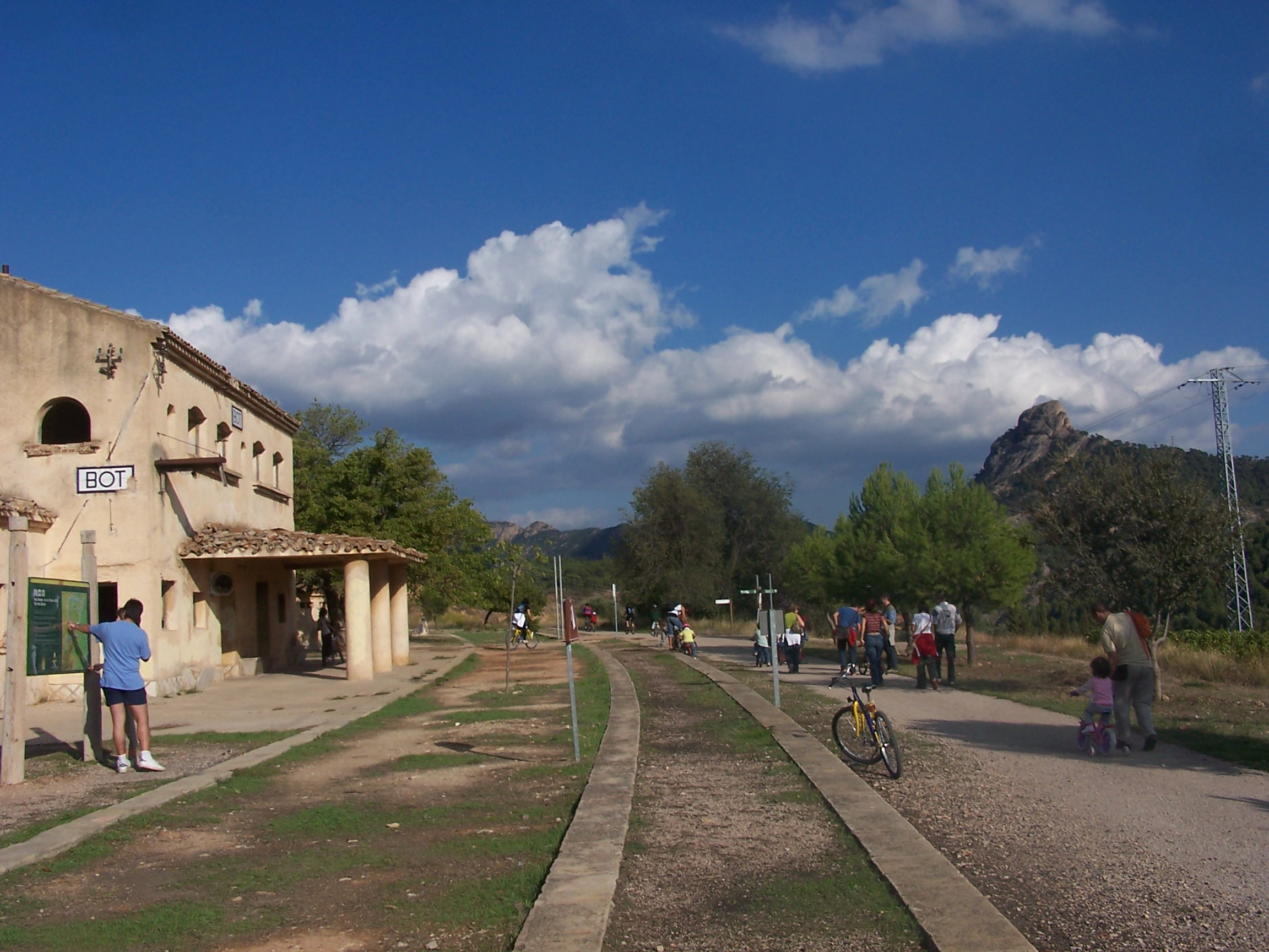 la via verda a bot